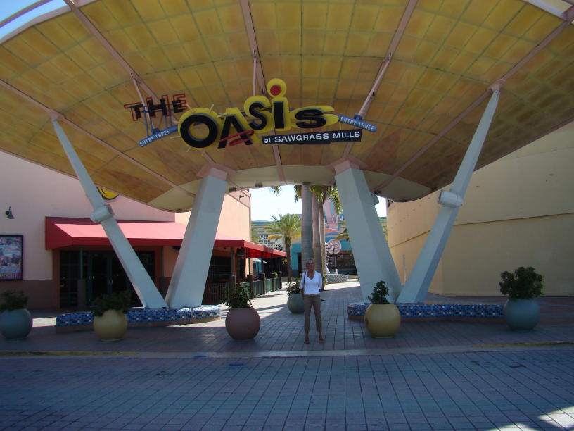 Fort Lauderdale, Sawgrass Mills